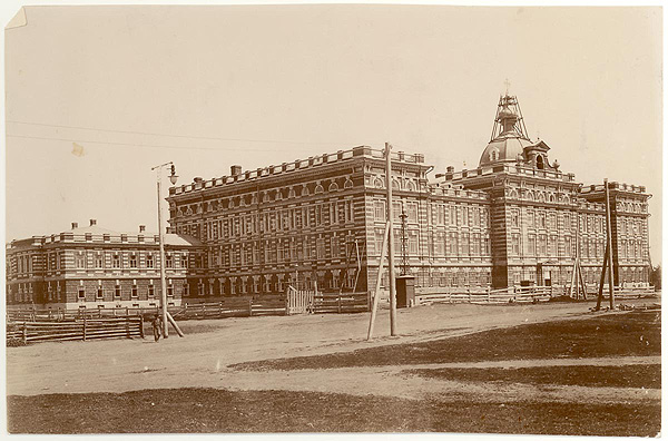 Здание епархиального женского училища в Елабуге. Автор неизвестен. 1890-е гг.